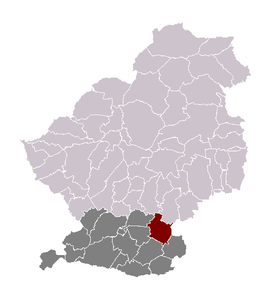 Monchecourt dans son canton et son arrondissement